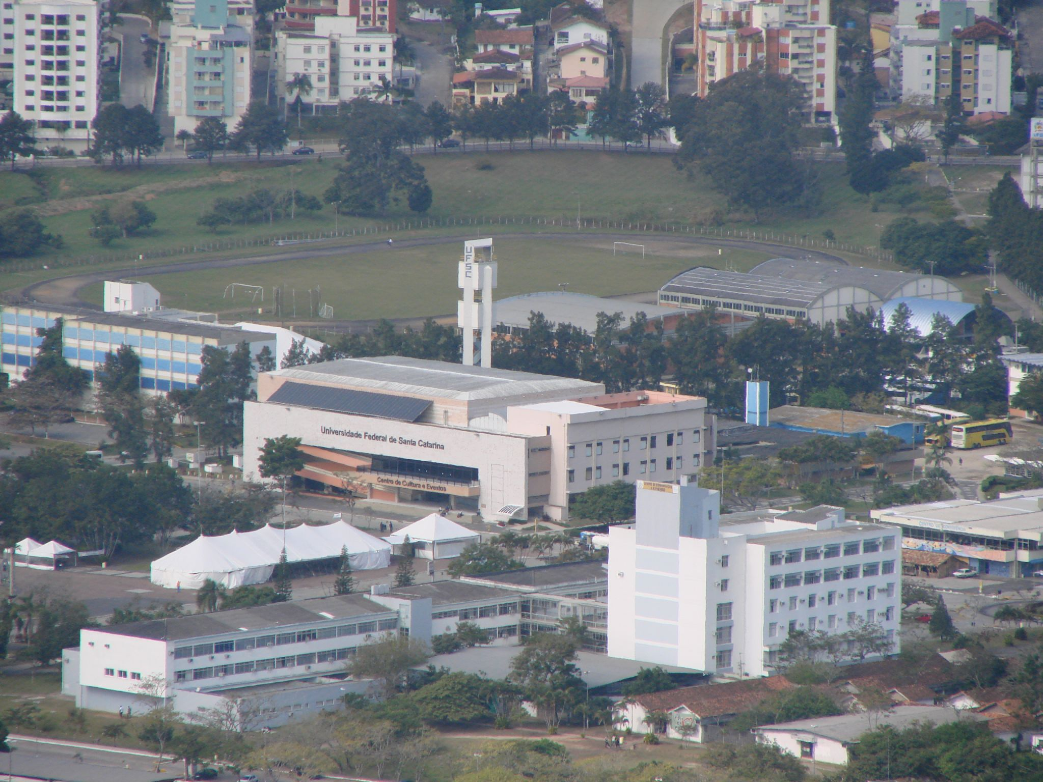 Parte do campus da UFSC, com destaque para o Centro de Cultura e Eventos no centro da imagem.